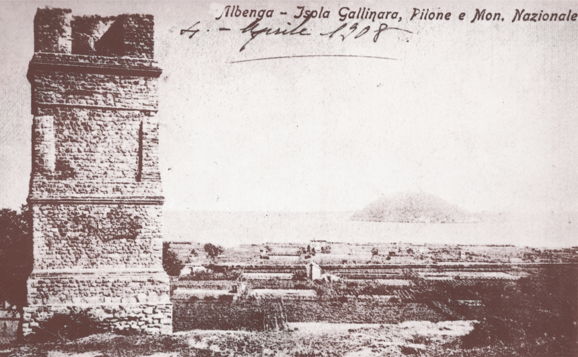 Pilone romano 1908 appena restaurato da Alfredo D'Andrade